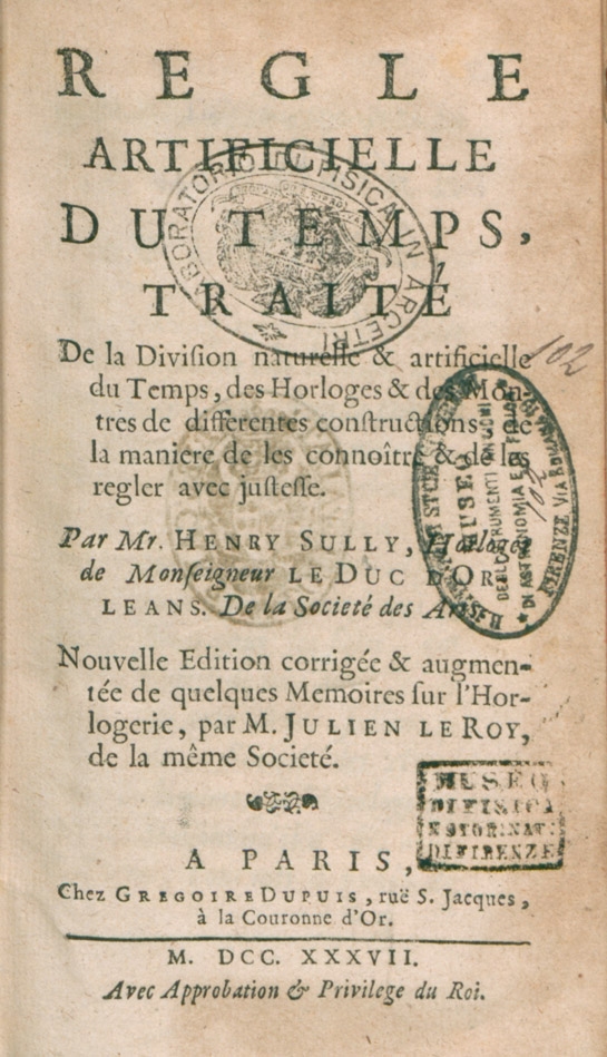 Frontespizio